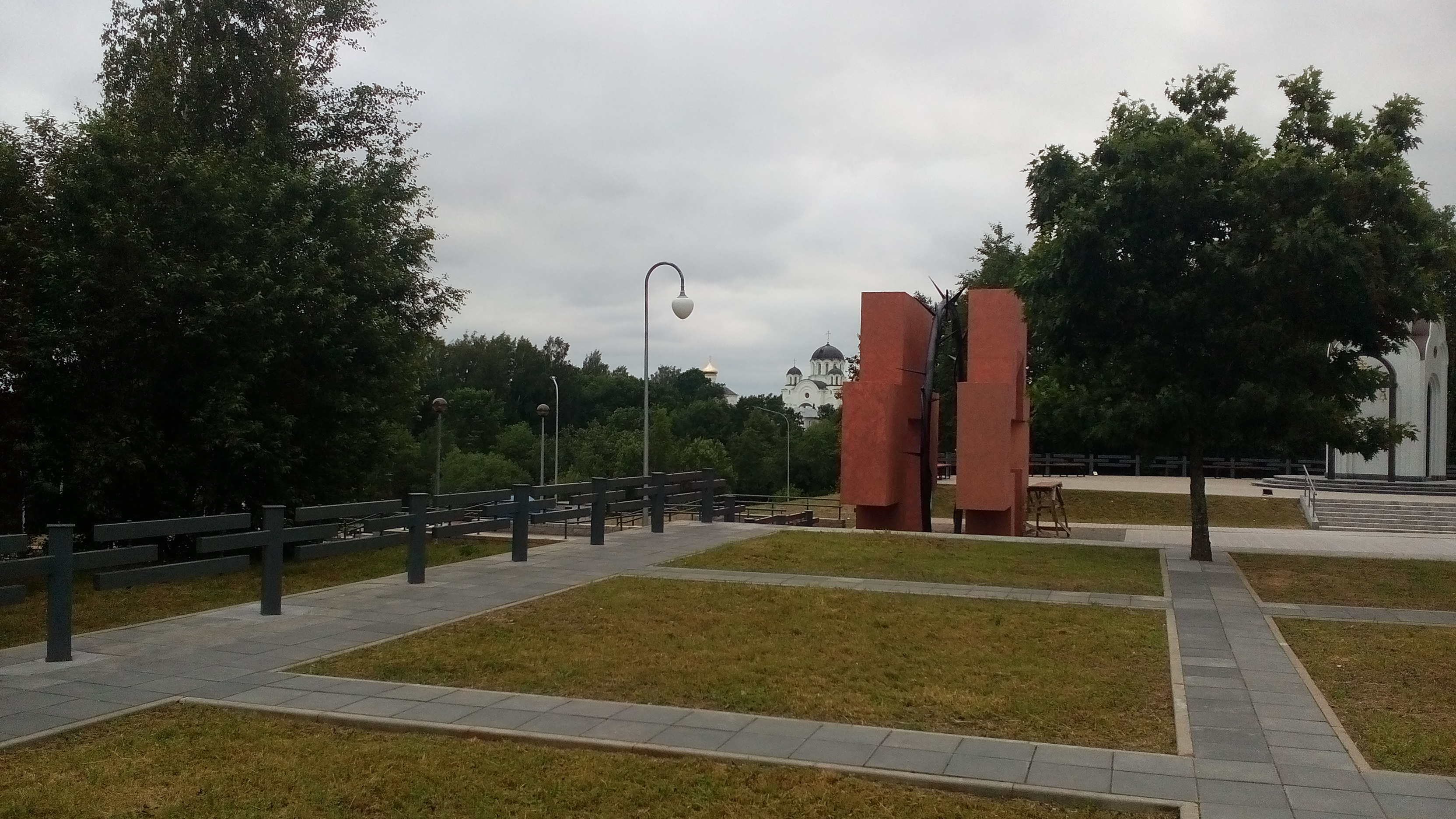 Урочище Пески 21 июня 2020